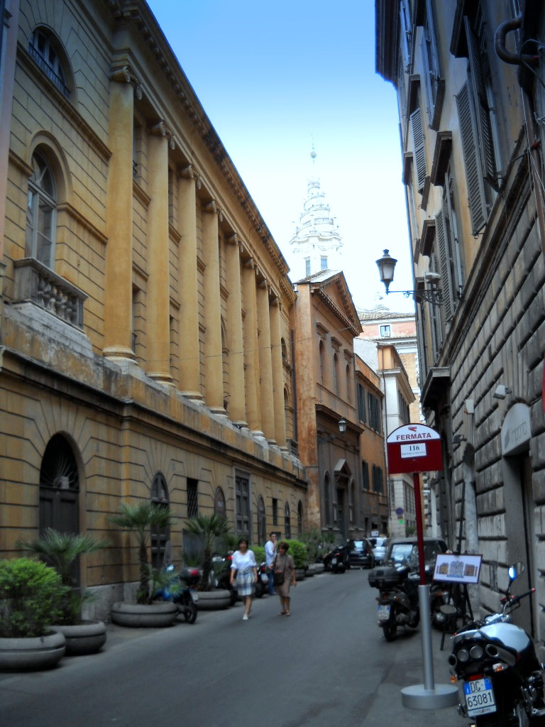 Teatro Valle nel rione Sant'Eustachio di Roma